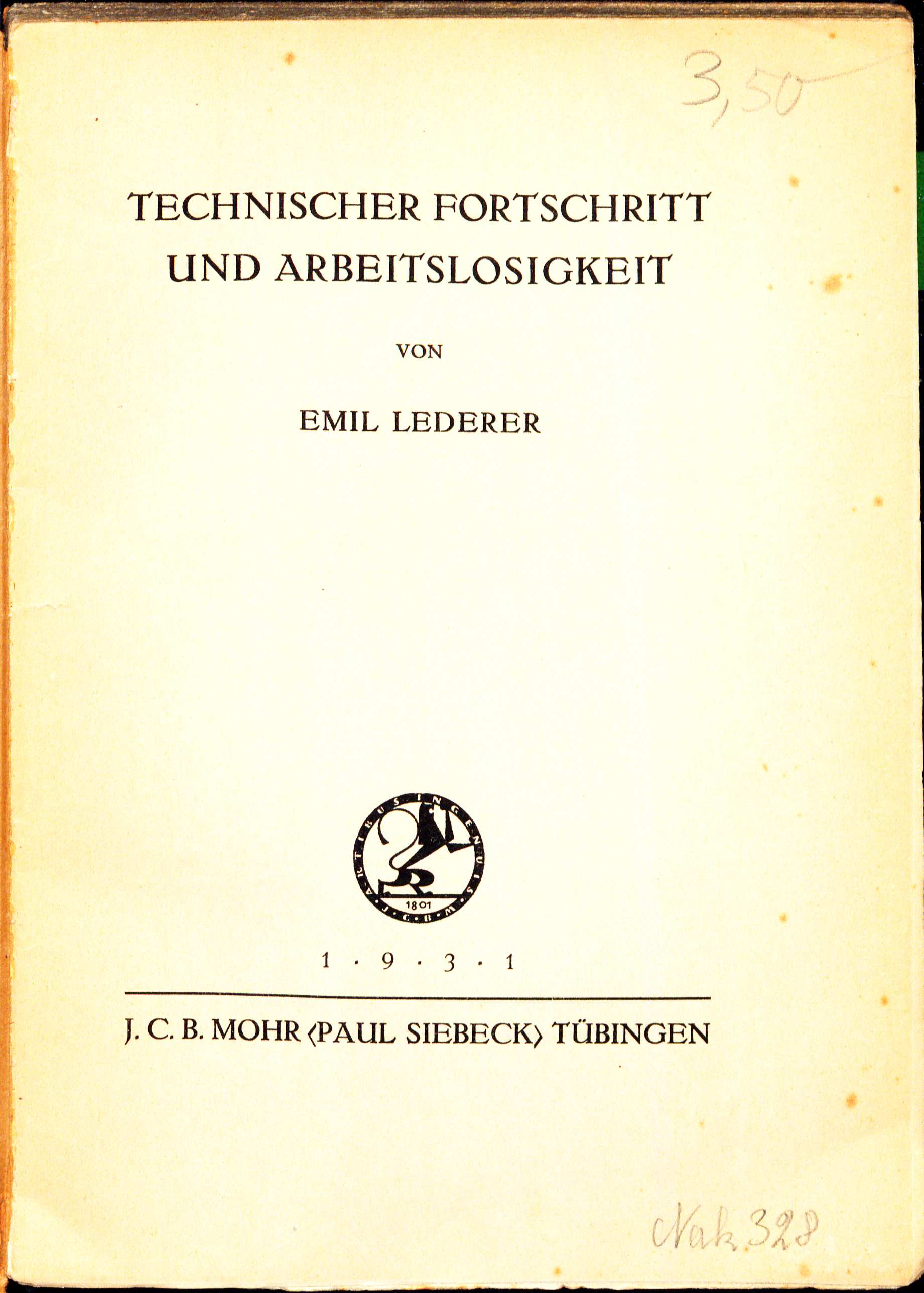 Emil Lederer Technischer Fortschritt und Arbeitslosigkeit 1931 Titel